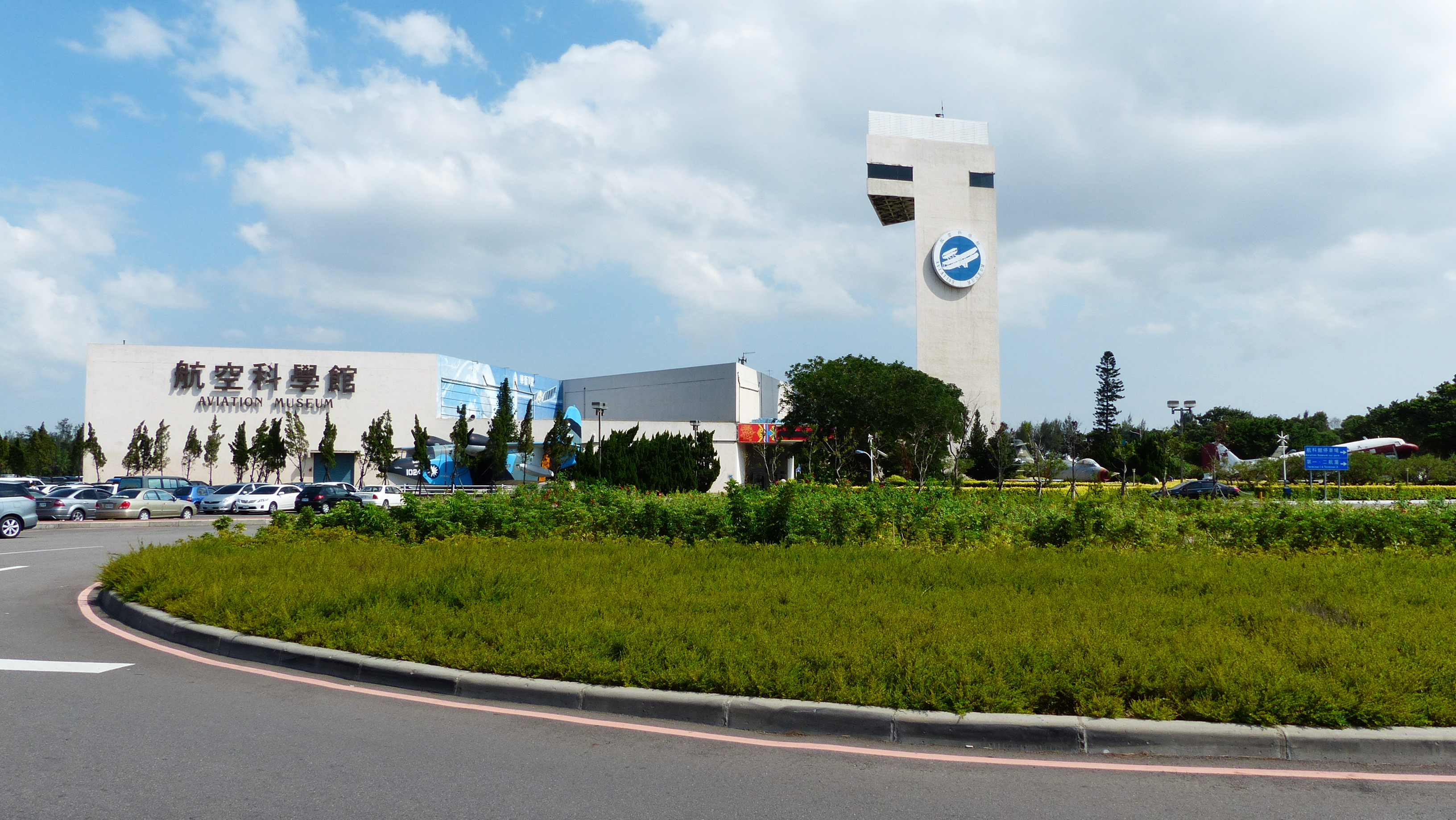 由航站北路東南望航空科學館西北面全景。